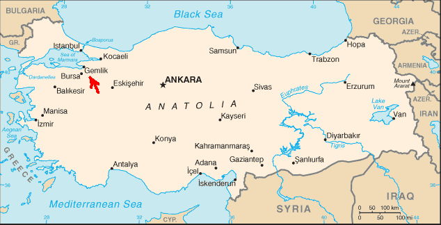 Kaart van Turkije van CIA World factbook, door Bemoeial in png omgezet, en door mij enkel Gemlik met een rode pijl aangegeven N.B.: Vervang deze kaart gerust door iets beters, ik dacht dat het artikel met deze kaart in ieder geval al wat beter was dan zonder, maar er valt nog erg veel aan te verbeteren! Flyingbird|40px| 23 jul 2004 20:44 (CEST)